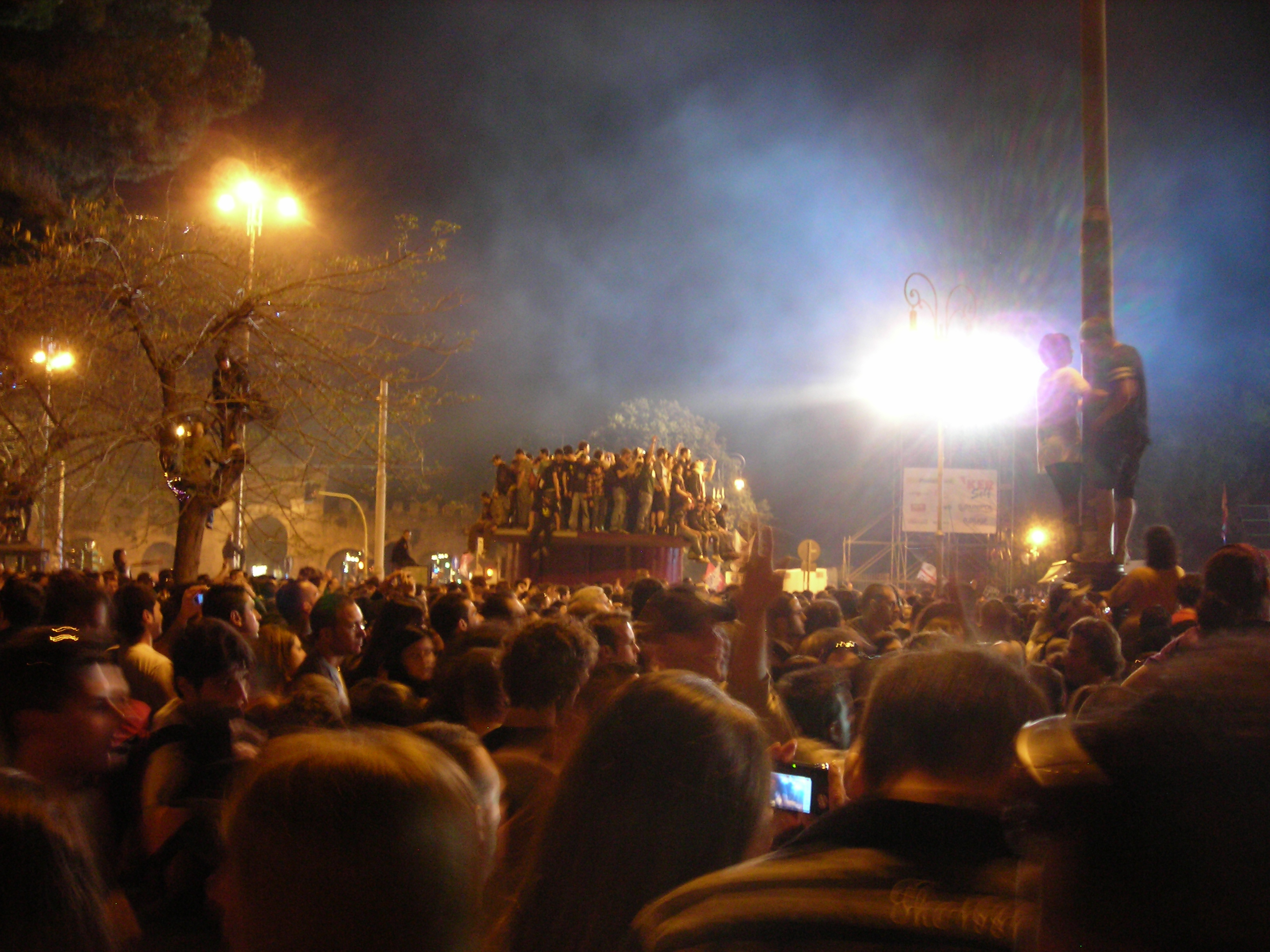 Il Concerto del Primo Maggio del 2009 in Piazza di Porta San Giovanni a Roma.